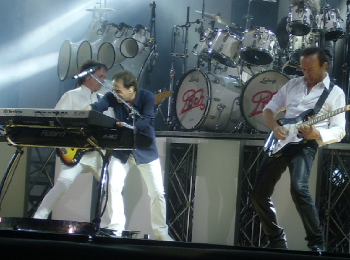 I Pooh durante un concerto